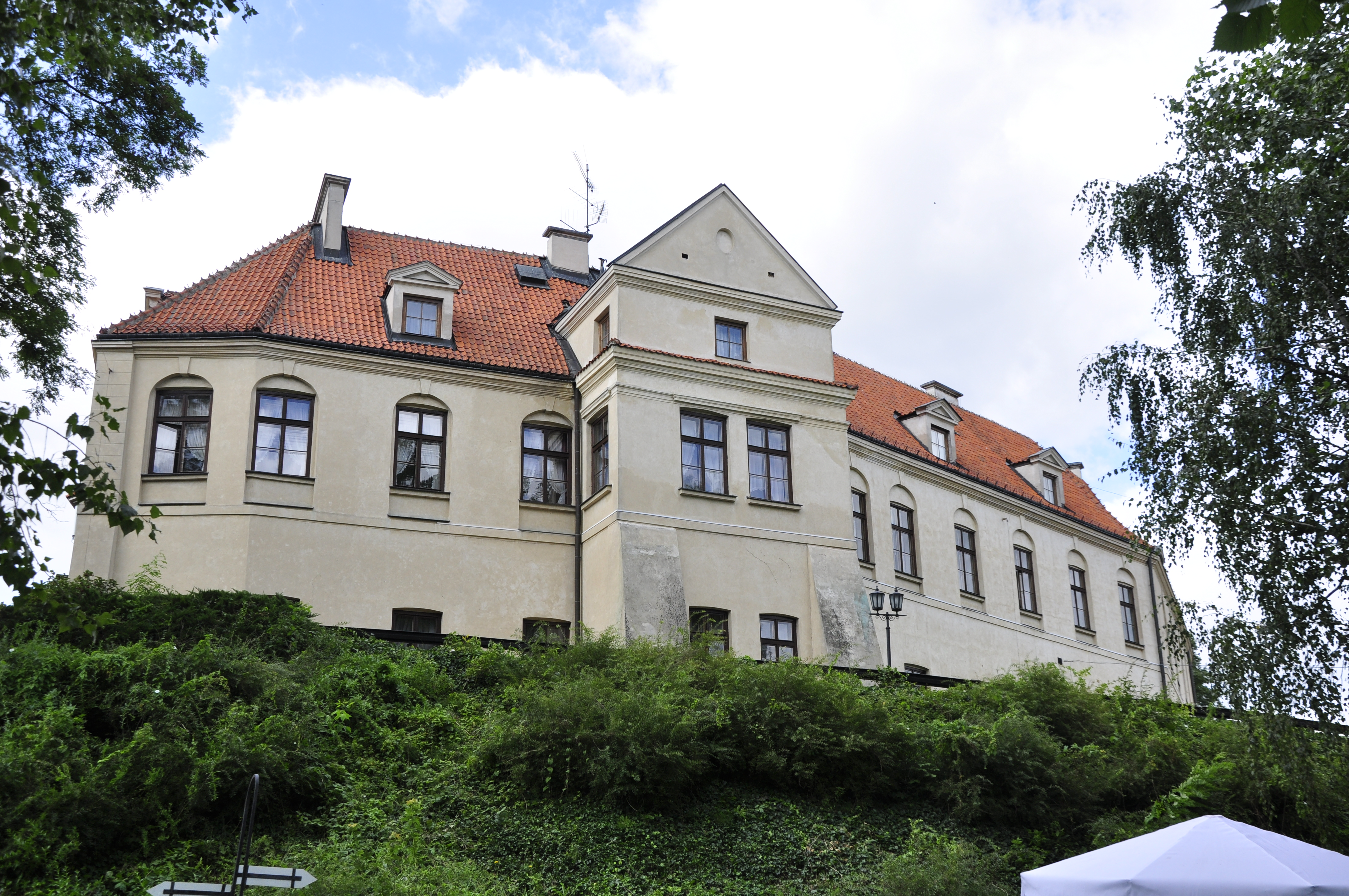 Schloss Pultusk, Polen